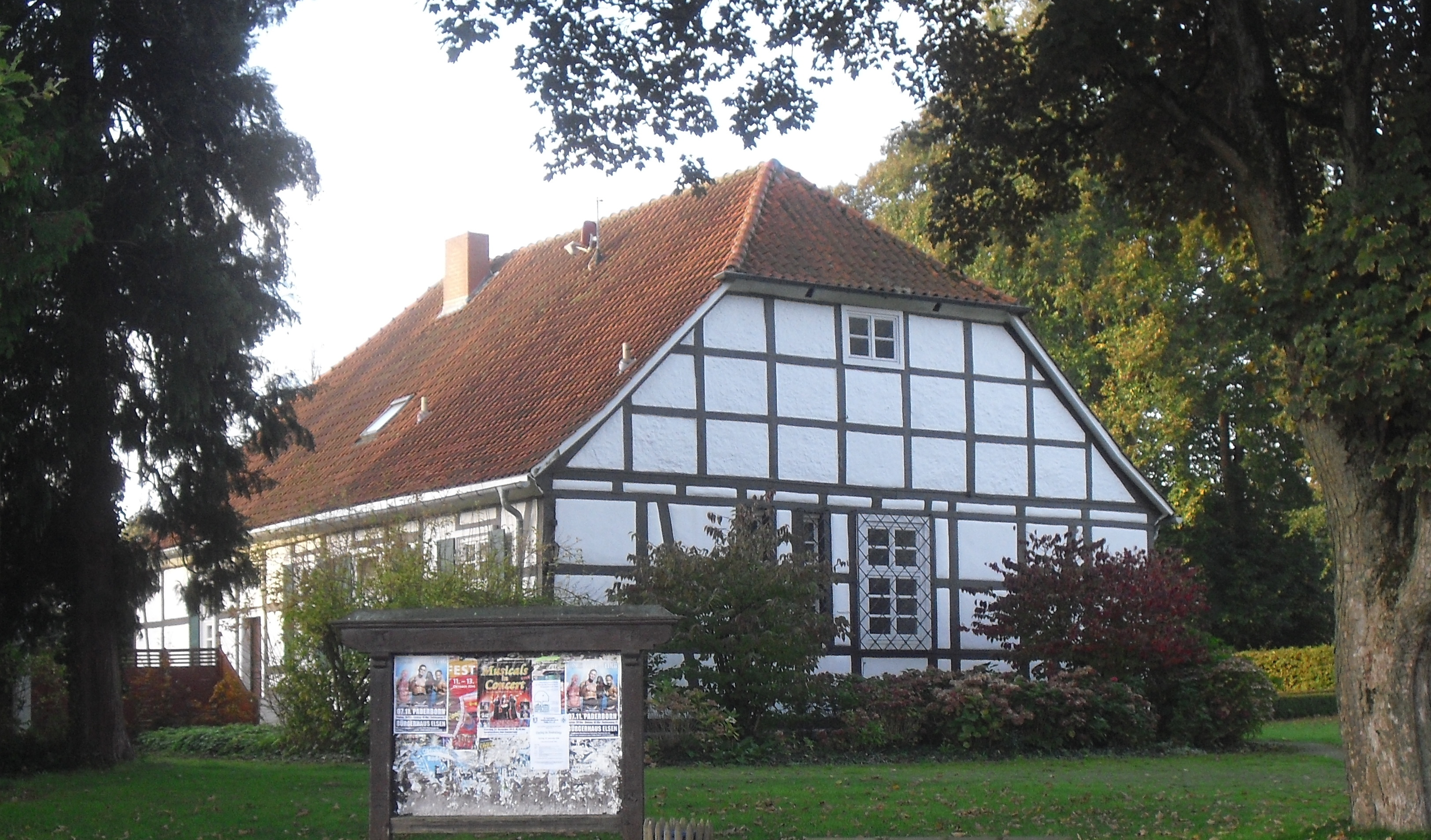 Pfarrhaus Westernstraße 1 in Thüle This is a photograph of an architectural monument.